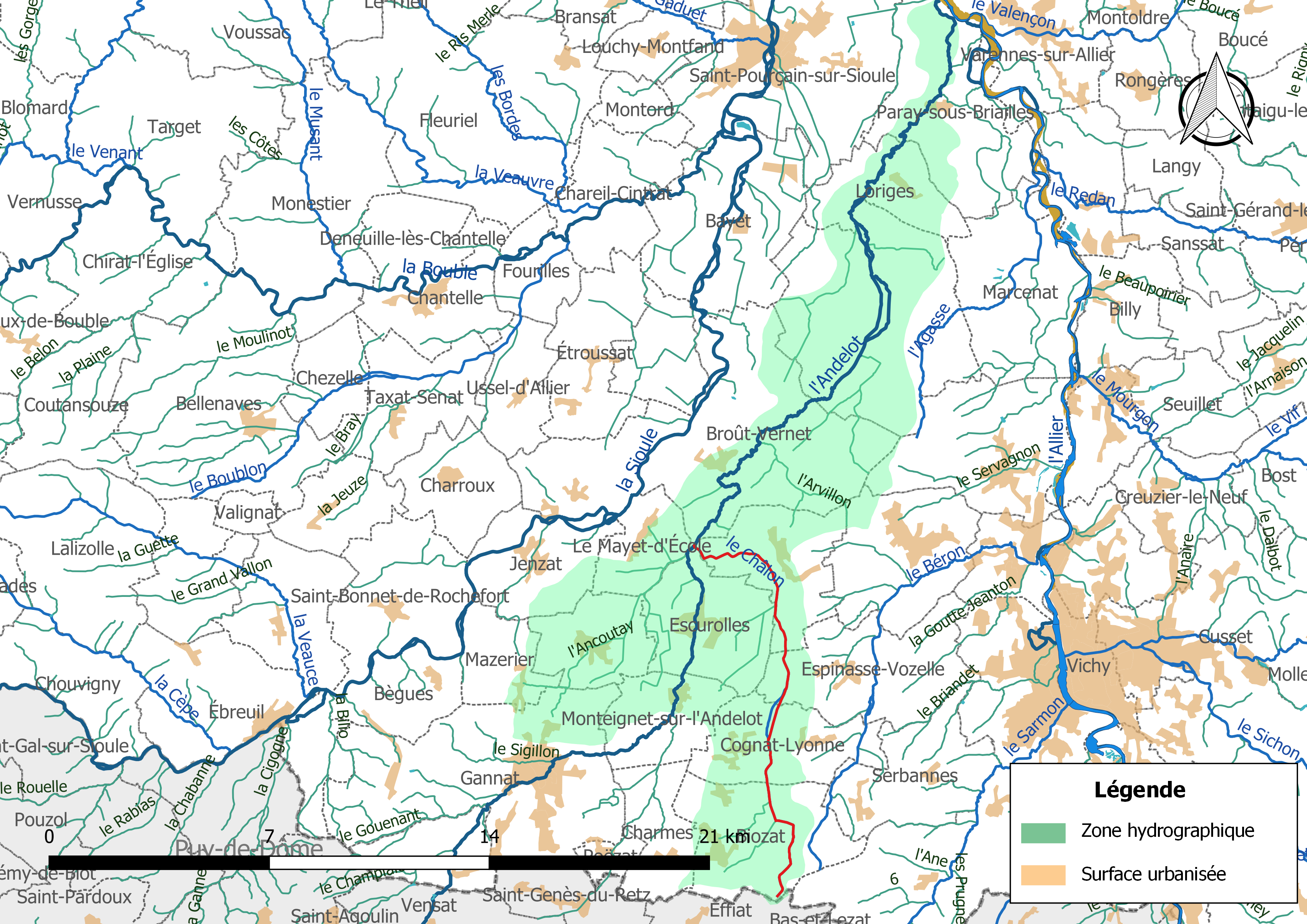 Carte du cours d'eau « le Châlon » (France) et de la zone hydrographique dans laquelle il s'insère.